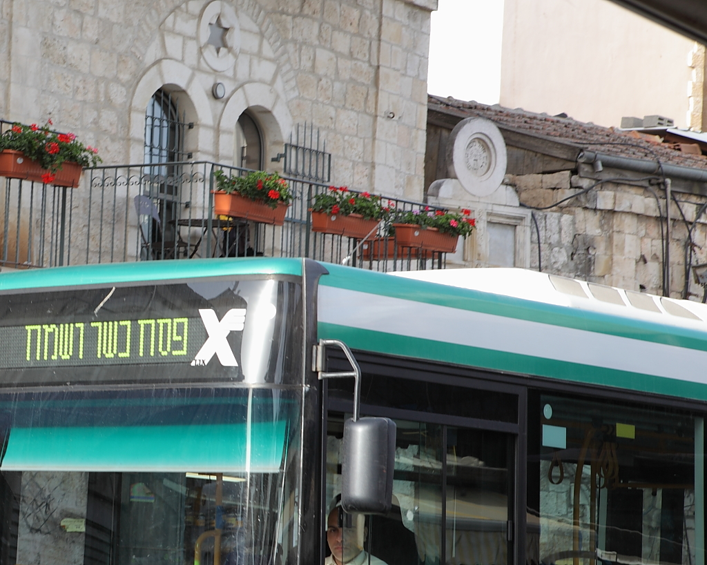 רחוב אגריפס, שוק מחנה יהודה, ירושלים Jerusalem